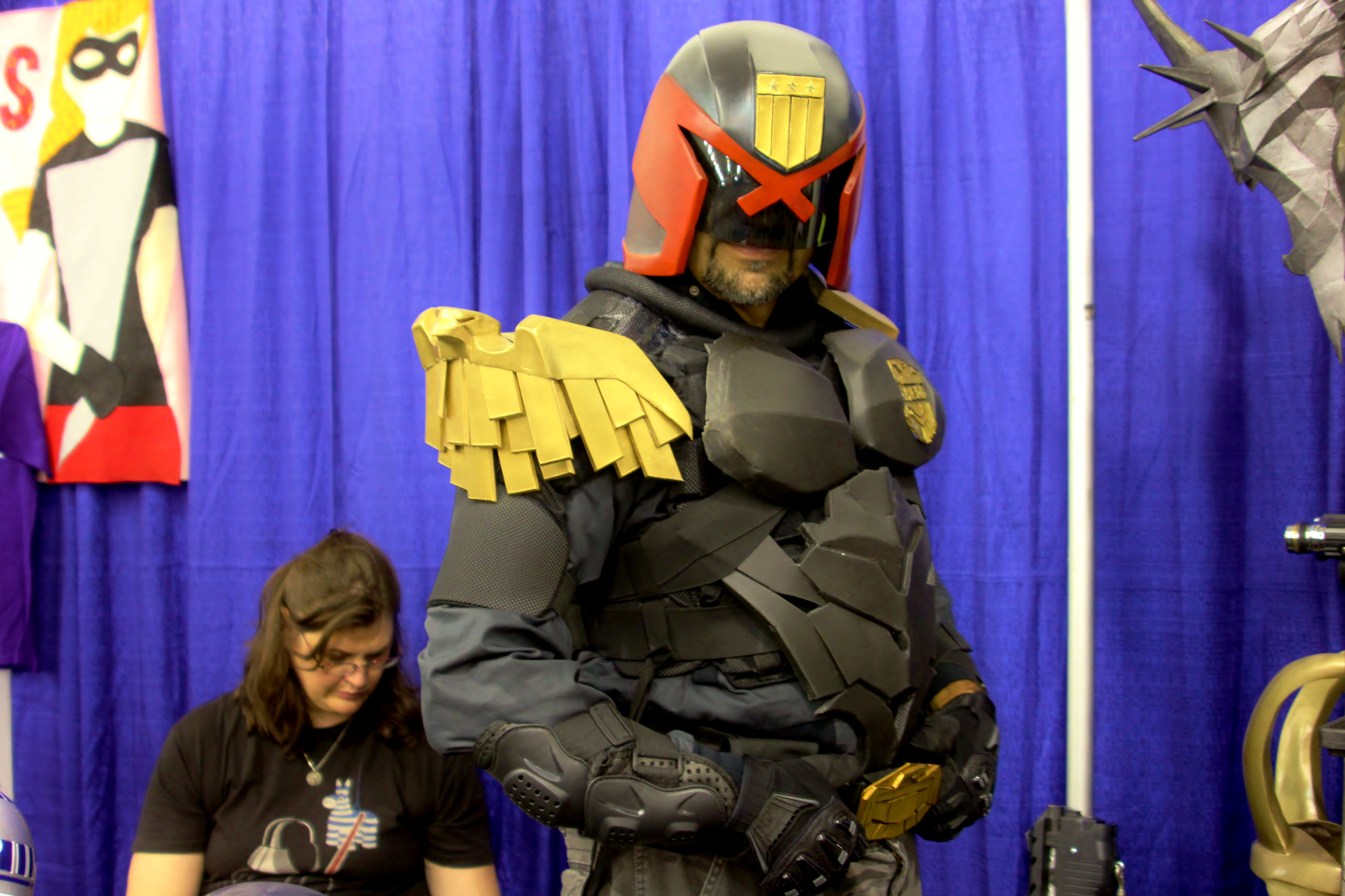 dredd cosplay